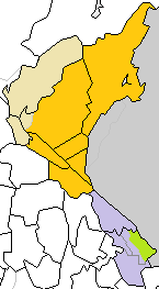 群馬県新田郡。